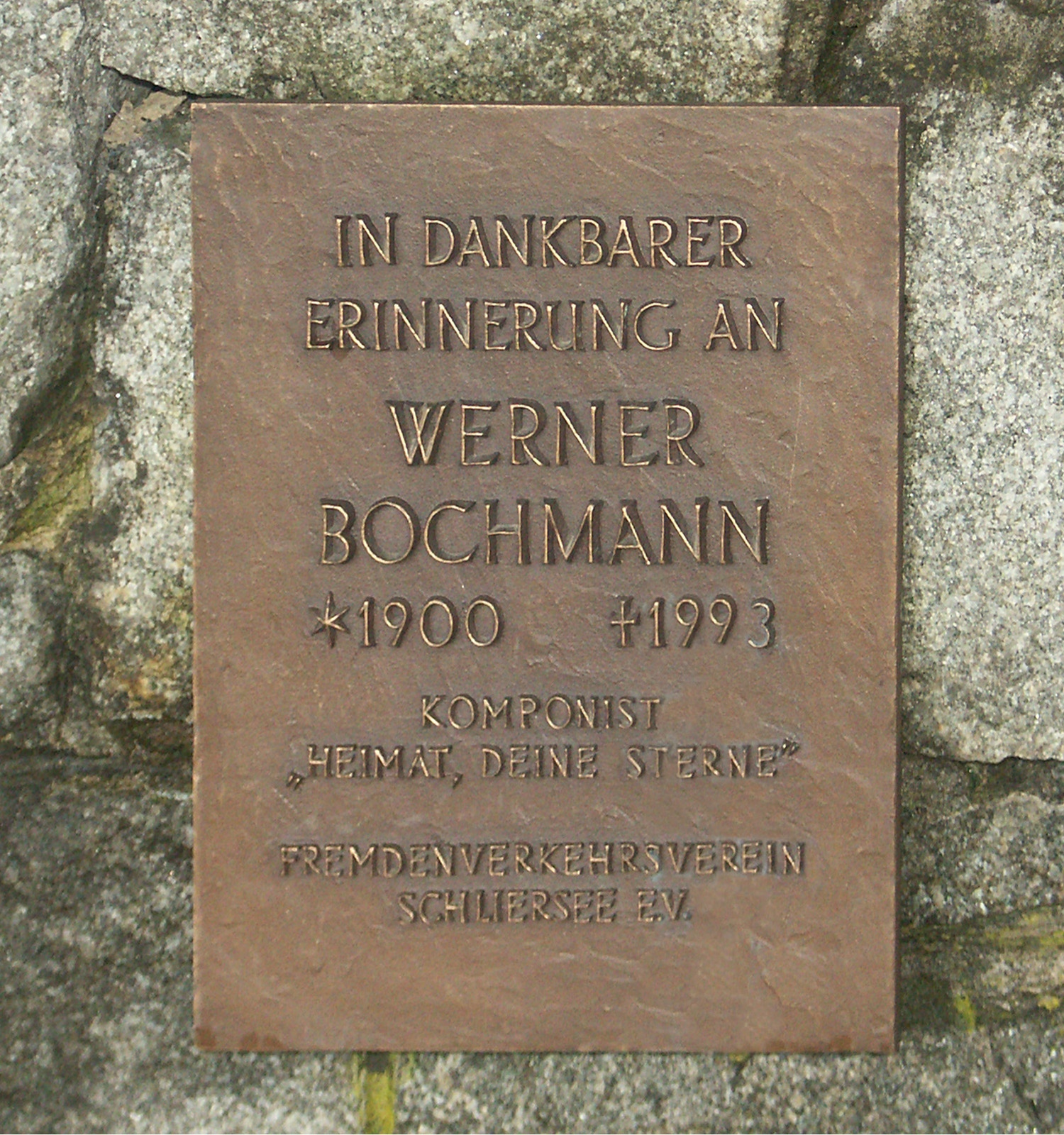 Gedächtnisplatte für Werner Bochmann in Schliersee (auf dem Hochburg-Hügel)